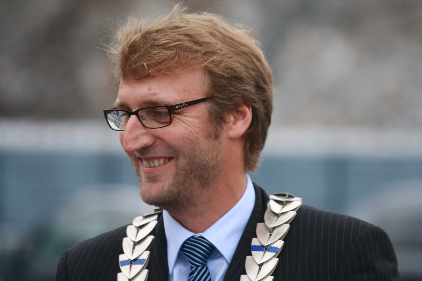 Stig Sørra